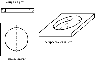 Exemple de tracé d'ellipse en dessin industriel : perçage d'une pièce parallèlépipédique vu en coupe de profil (figure en haut à gauche), de haut (figure en bas à gauche) et en perspective cavalière (figure de droite). On remarquera, sur la perspective, les deux trait d'axe dans le plan indiquant les directions des axes de référence, ainsi le trait d'axe figurant l'axe du perçage, perpendiculaire à la surface de la pièce. Auteur : Christophe Dang Ngoc Chan, réalisé avec un programme de dessin vectoriel Licence GFDL Christophe Dang Ngoc Chan